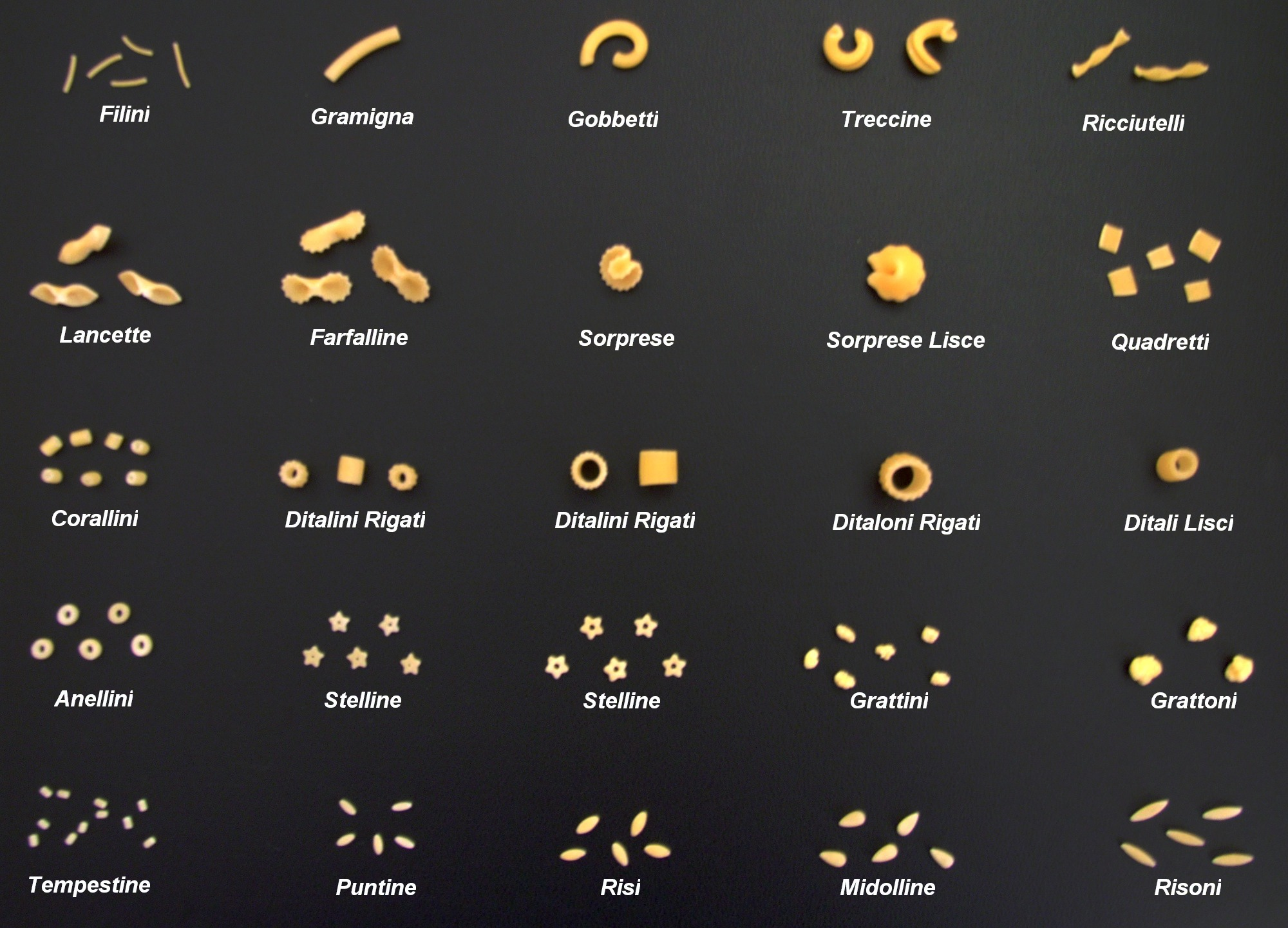 Quelle: selbst fotografiert, 11/2006 Fotograf: Späth Chr.